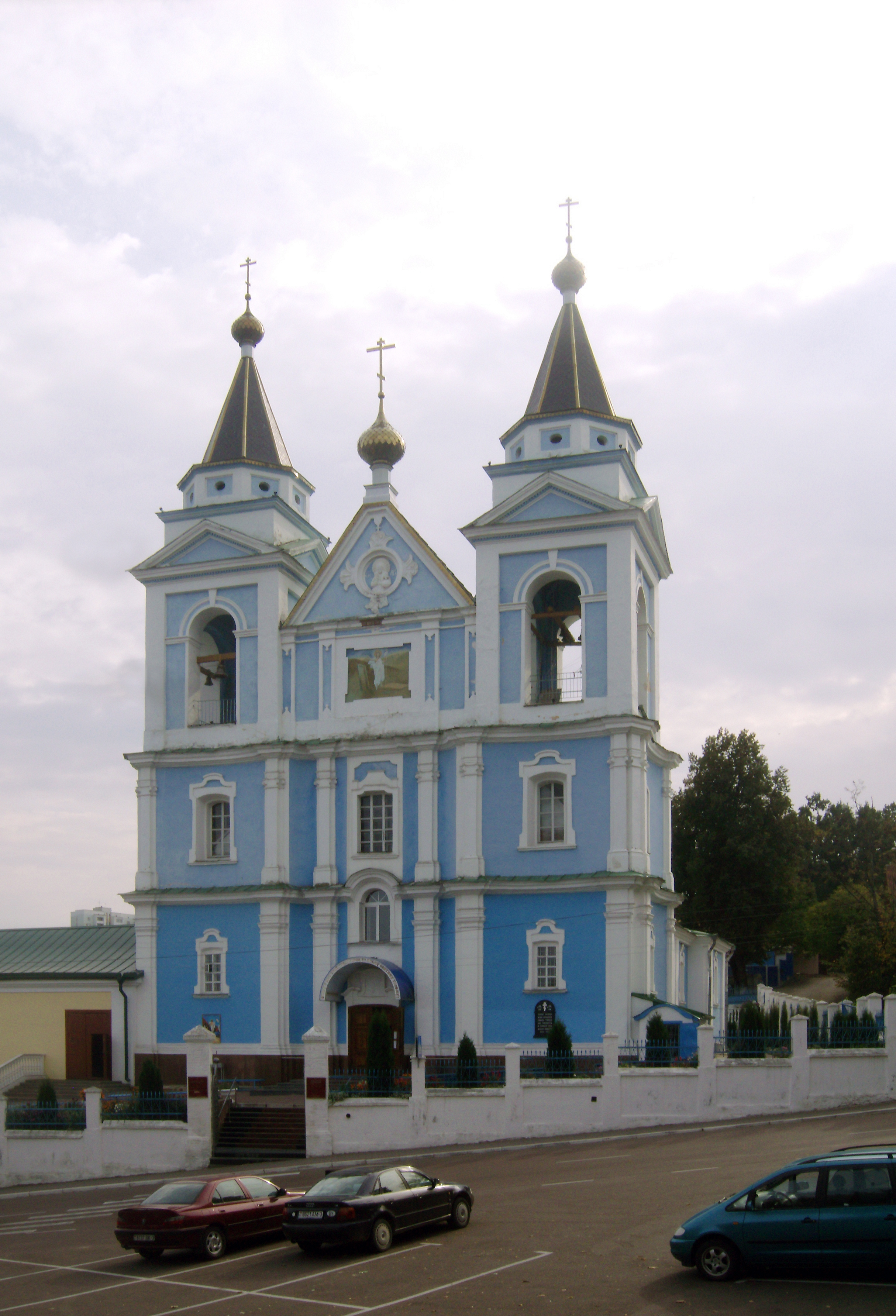 Комплекс катэдральнага сабору Сьвятога Арханёла Міхаіла (былы кляштар бэрнардынаў):касьцёлжылы корпус. г. Мазыр This is a photo of Belarusian heritage monument. Reference number: 312Г000511 ( WLM)